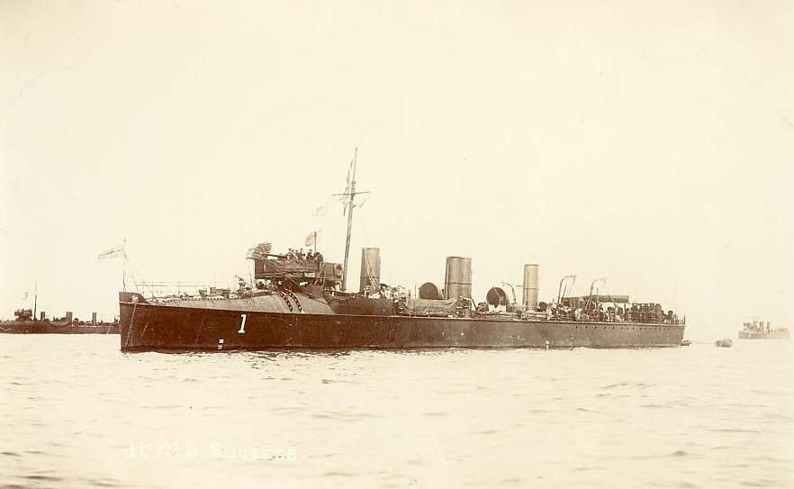 Der britische Zerstörer Success